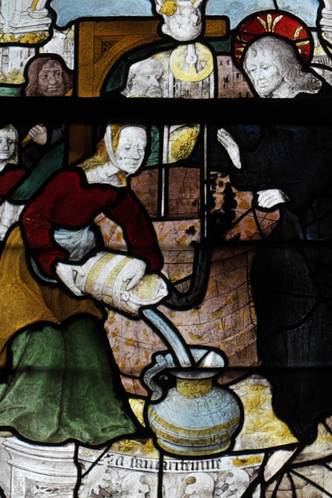 Katholische Kirche Saint-Pierre in Dreux im Département Eure-et-Loir (Centre-Val de Loire/Frankreich), Bleiglasfenster (baie 1) aus dem letzten Viertel des 15. Jahrhunderts von Pierre Courtois; Darstellung: Szenen aus dem Leben Jesu (Tötung der Unschuldigen Kinder, Flucht nach Ägypten, Jesus unter den Schriftgelehrten, Hochzeit von Kana, Jesus und die Samariterin, Gastmahl bei Simon dem Pharisäer, Jesus und die Ehebrecherin, Brotvermehrung; im Maßwerk: Gottvater); Ausschnitt: Jesus und die Samariterin, mit Signatur: Pierre Courtois (auf dem Krug)